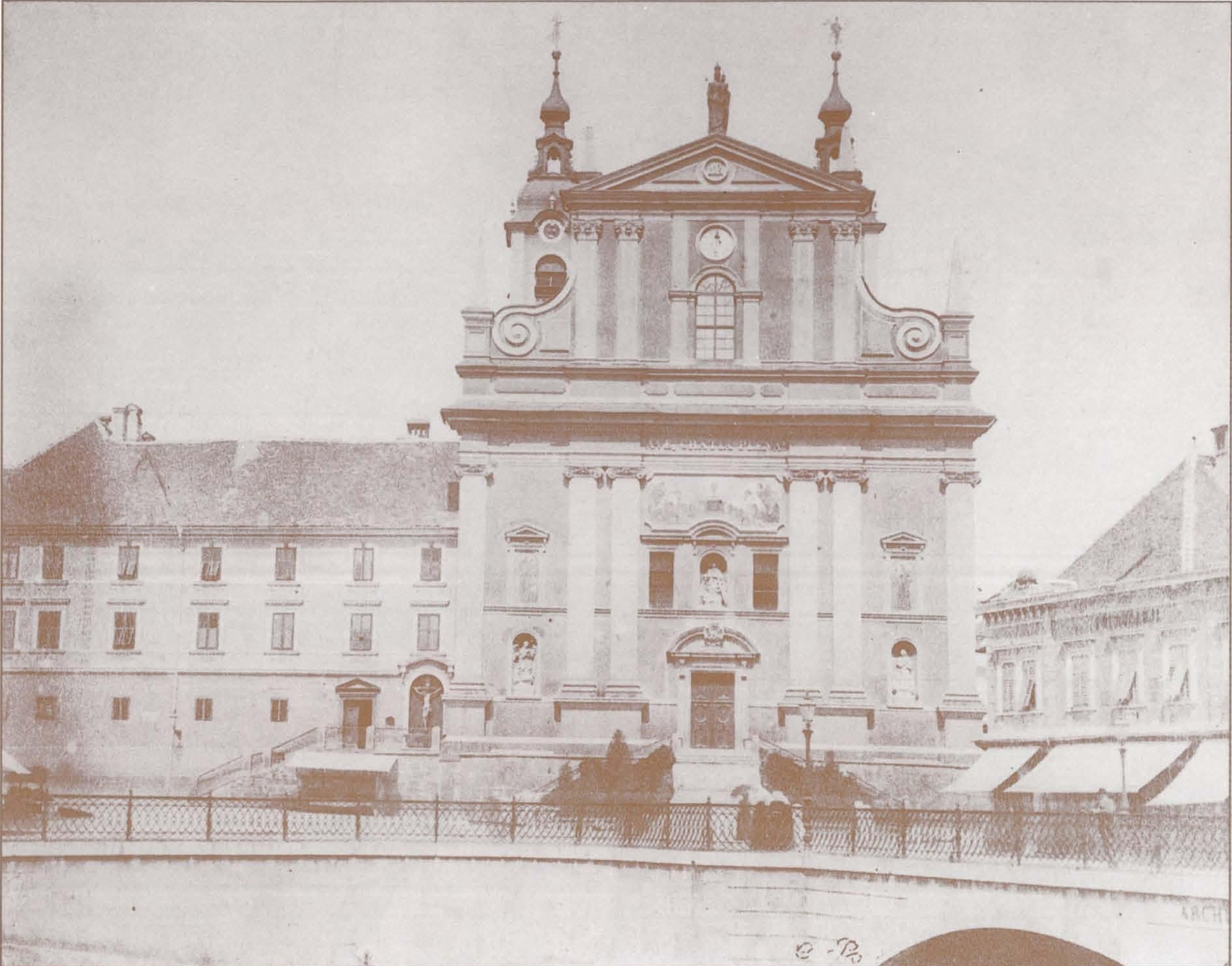 Frančiškanska cerkev